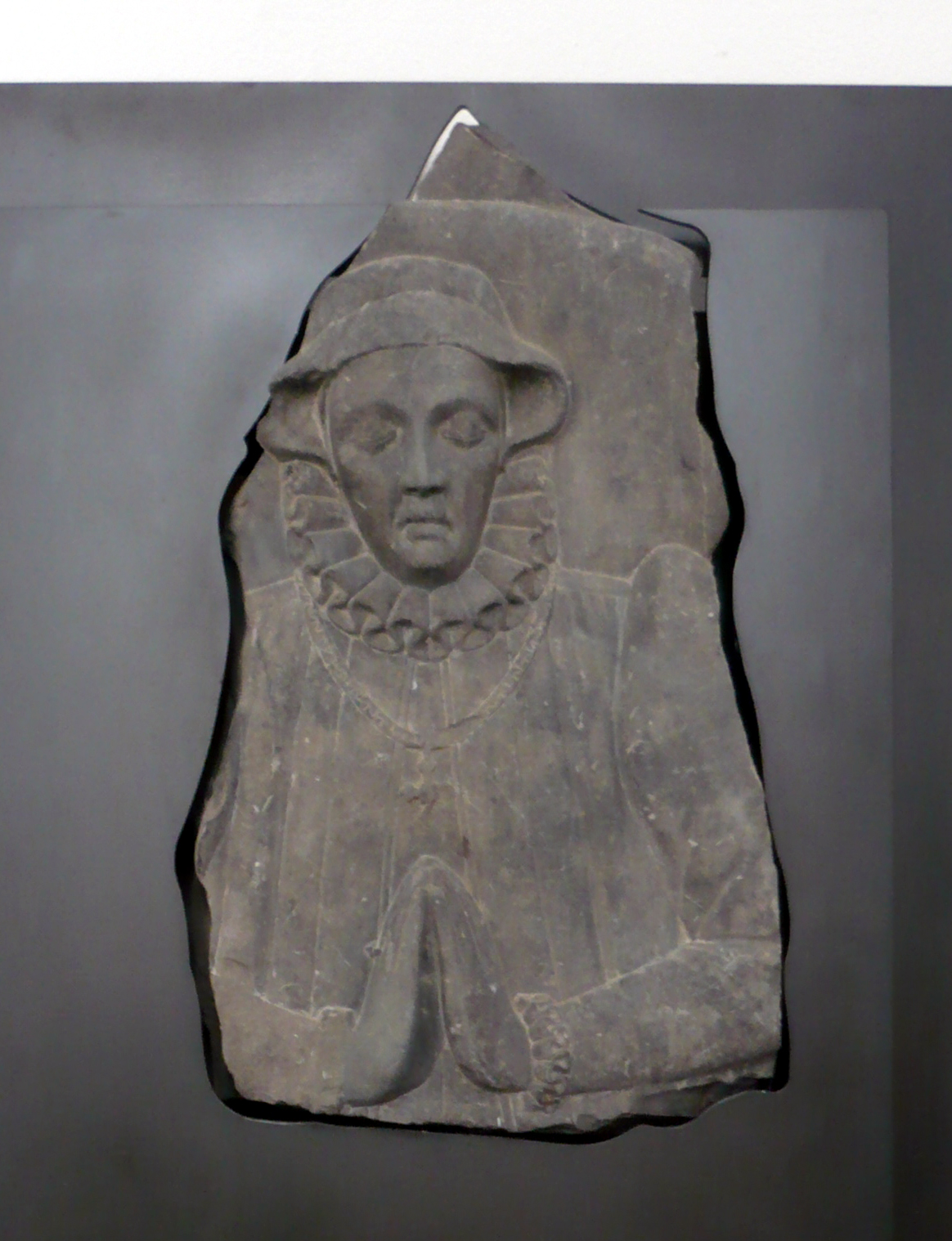 Grabrelief einer unbekannten jungen Frau in St. Maria Magdalena Geldern